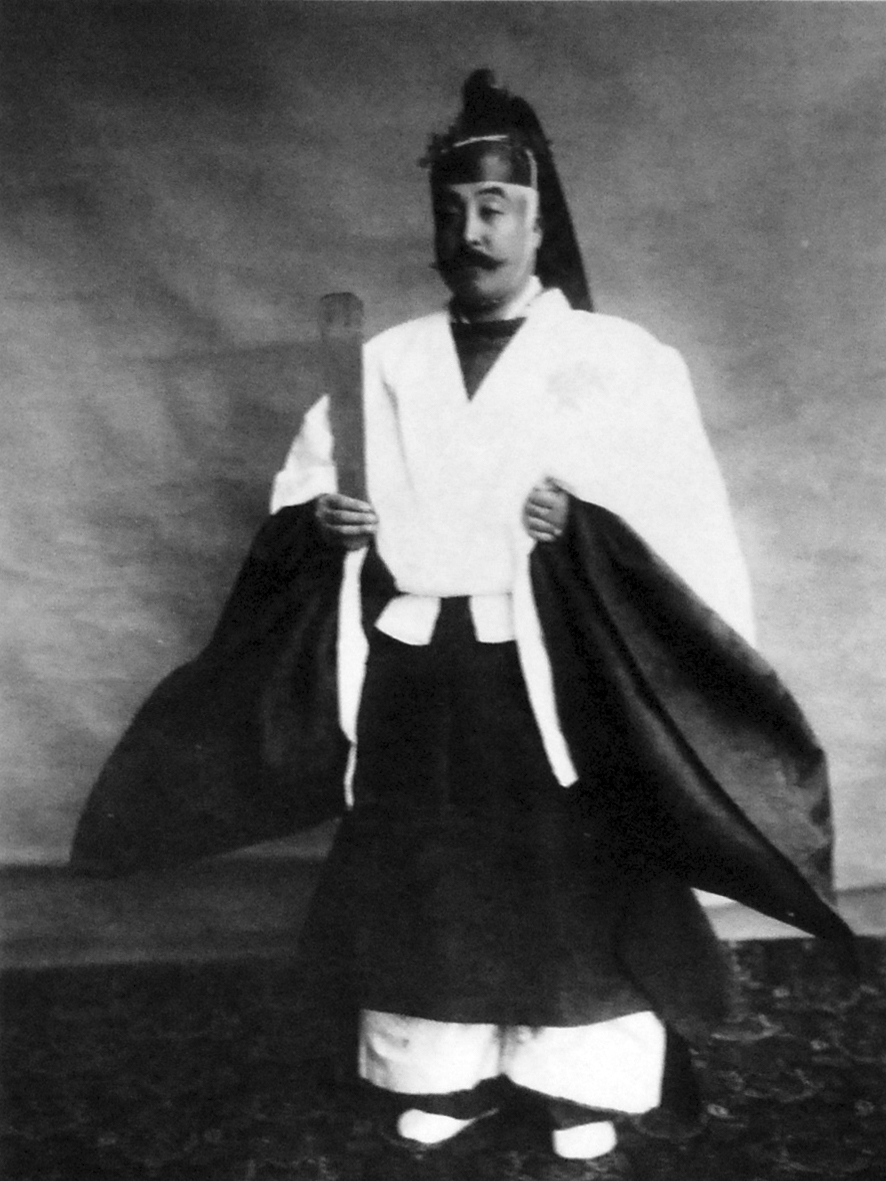 梨本宮守正王(Nashimoto-no-miya Morimasa)。大正天皇の大嘗祭(11/13)にあたって